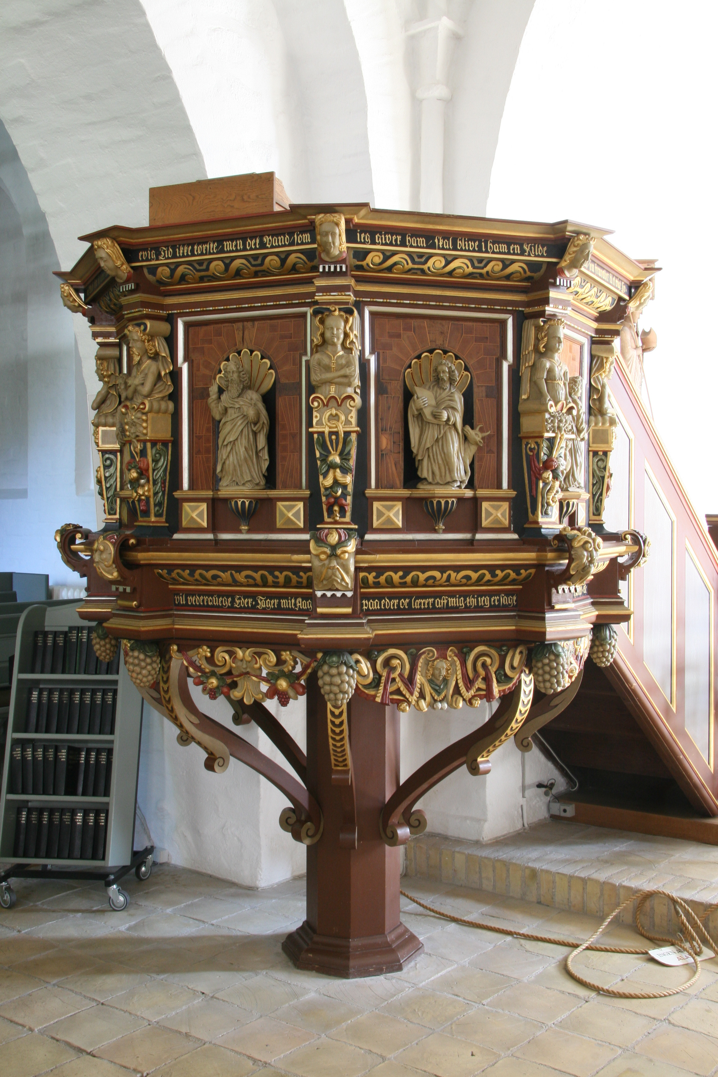 Sankt Peders Kirke in Slagelse, Denmark. Pulpit